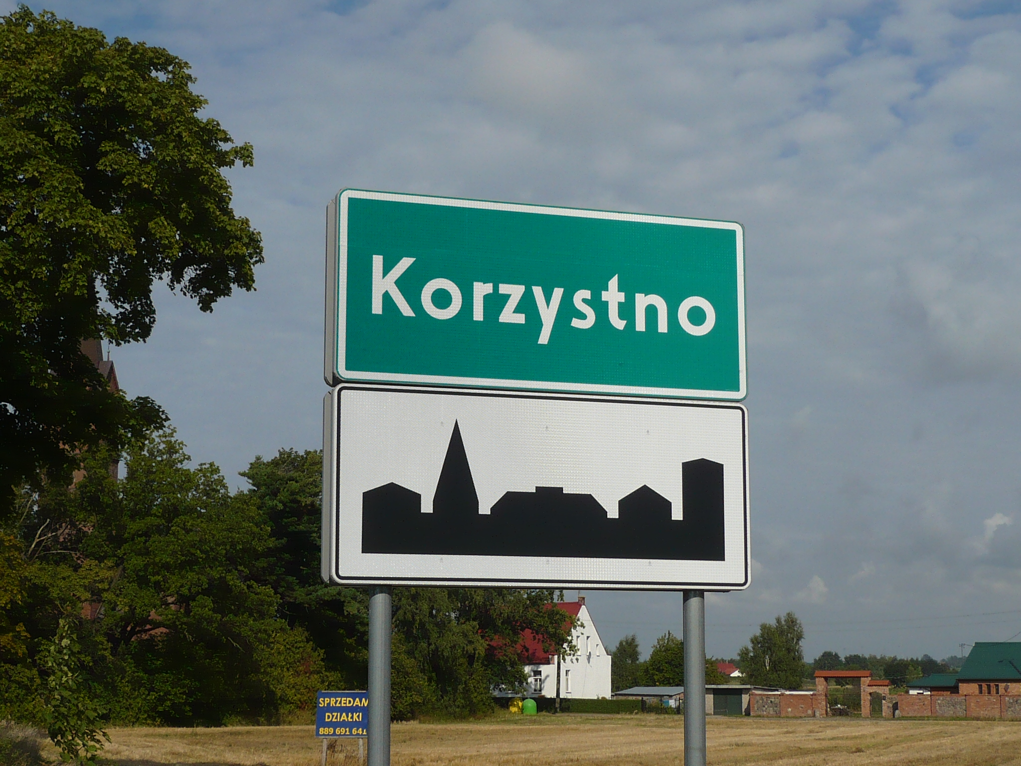 Korzystno, znak